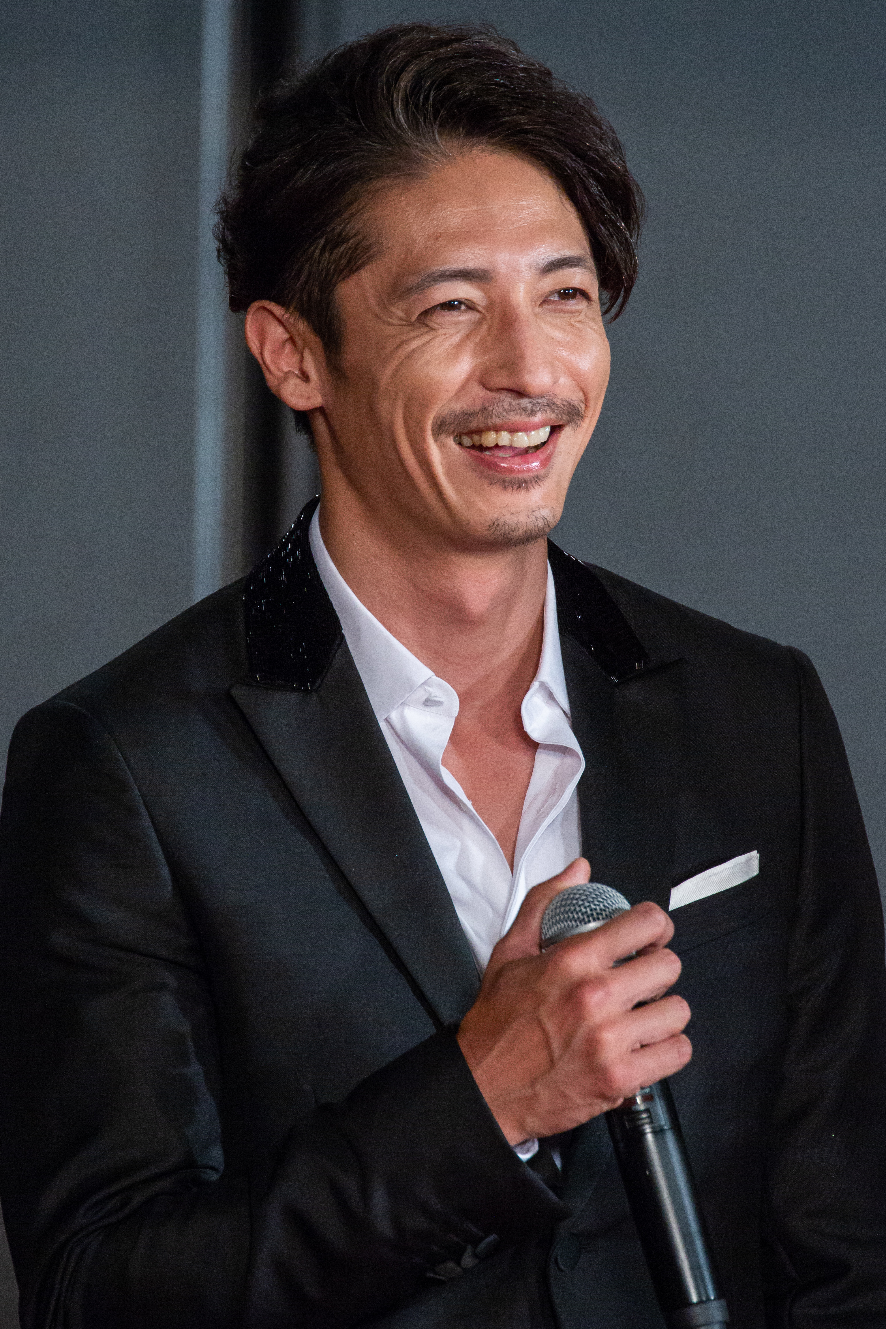 ジュラシック・ワールド/炎の王国 ジャパン・プレミア レッドカーペット 玉木宏